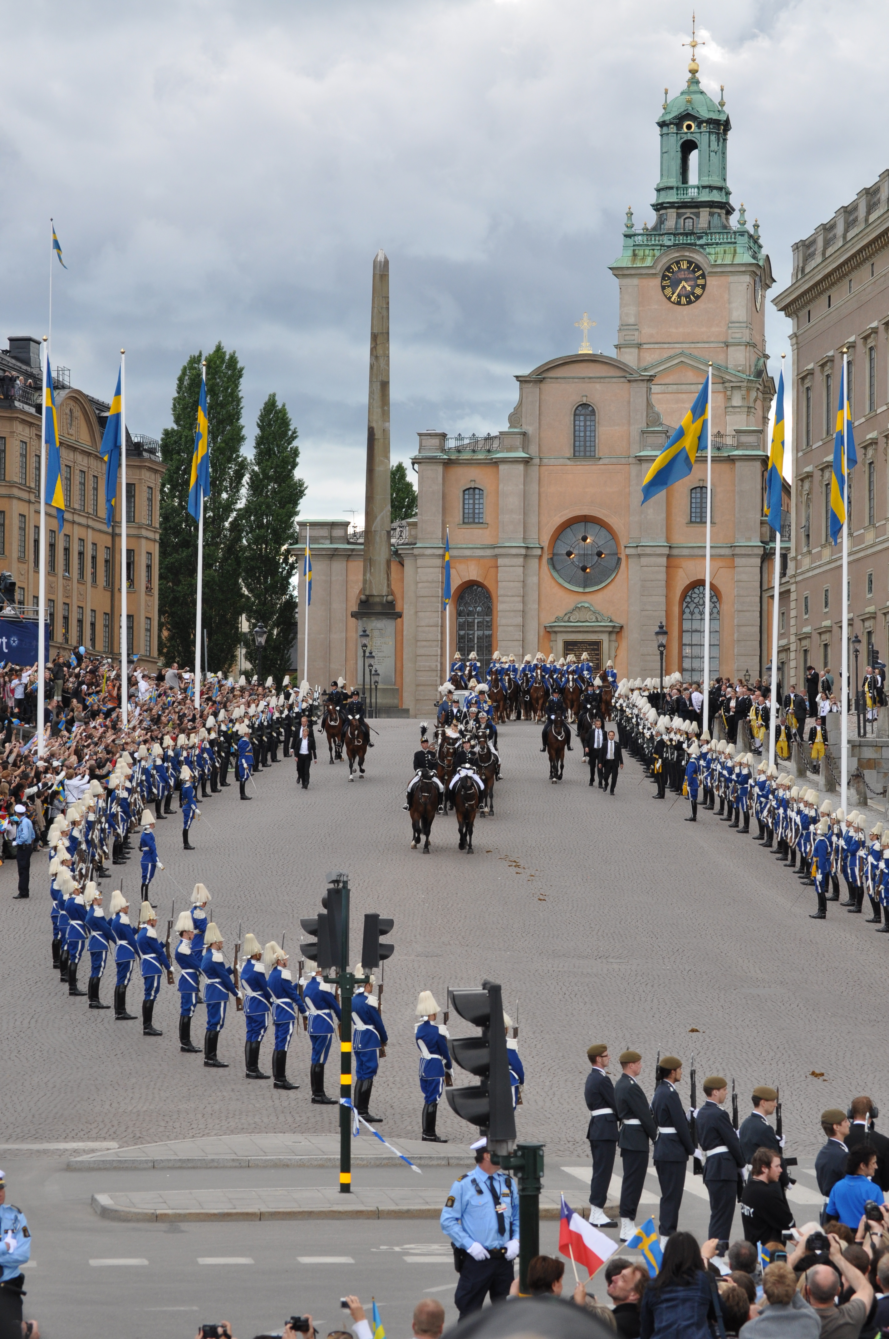 guards at slottsbacken